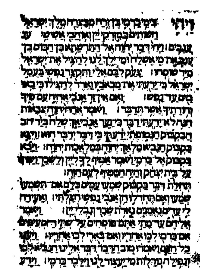 עמוד מתוך הספר חבקבוק הנביא